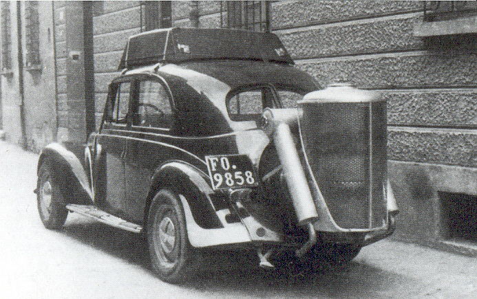 Un'auto dotata di impianto gasogeno Fonte: foto tratta dal Libro: "Storia della vita e automobili di Ilario Bandini", Ilario Bandini